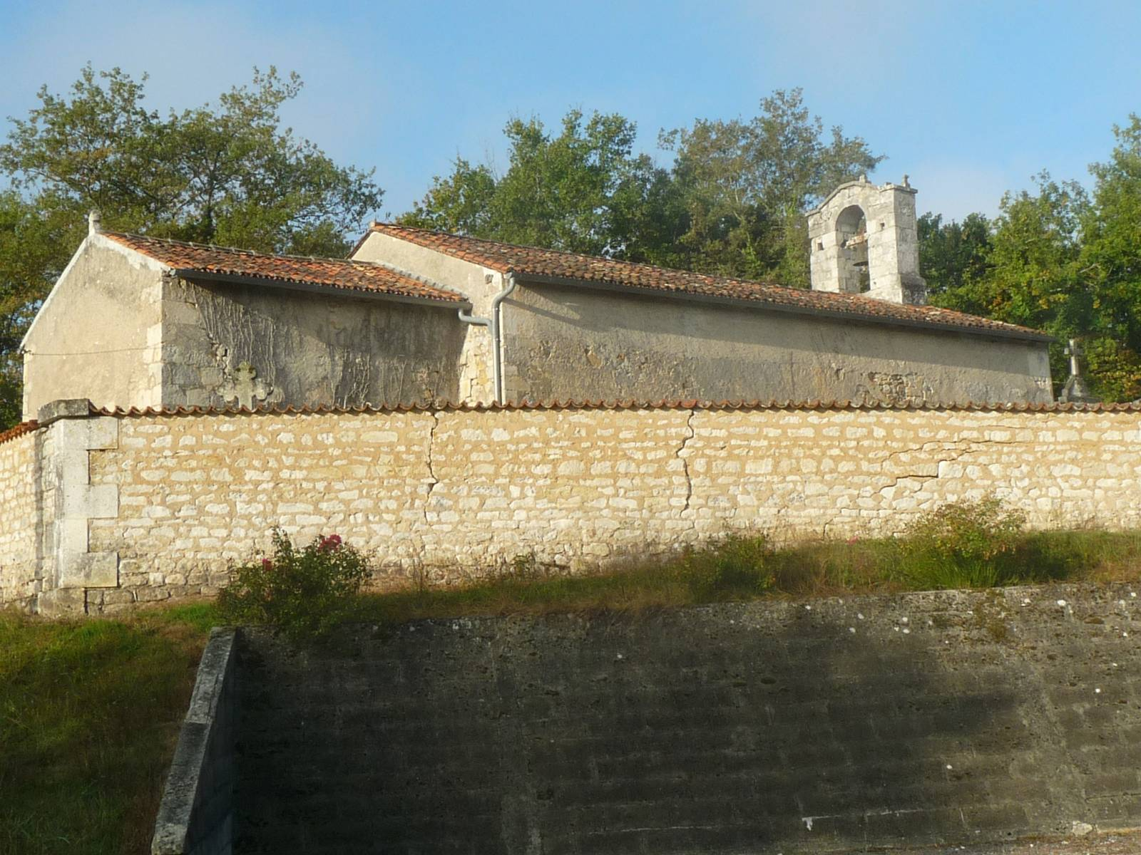 chapelle de Guizengeard (16), France